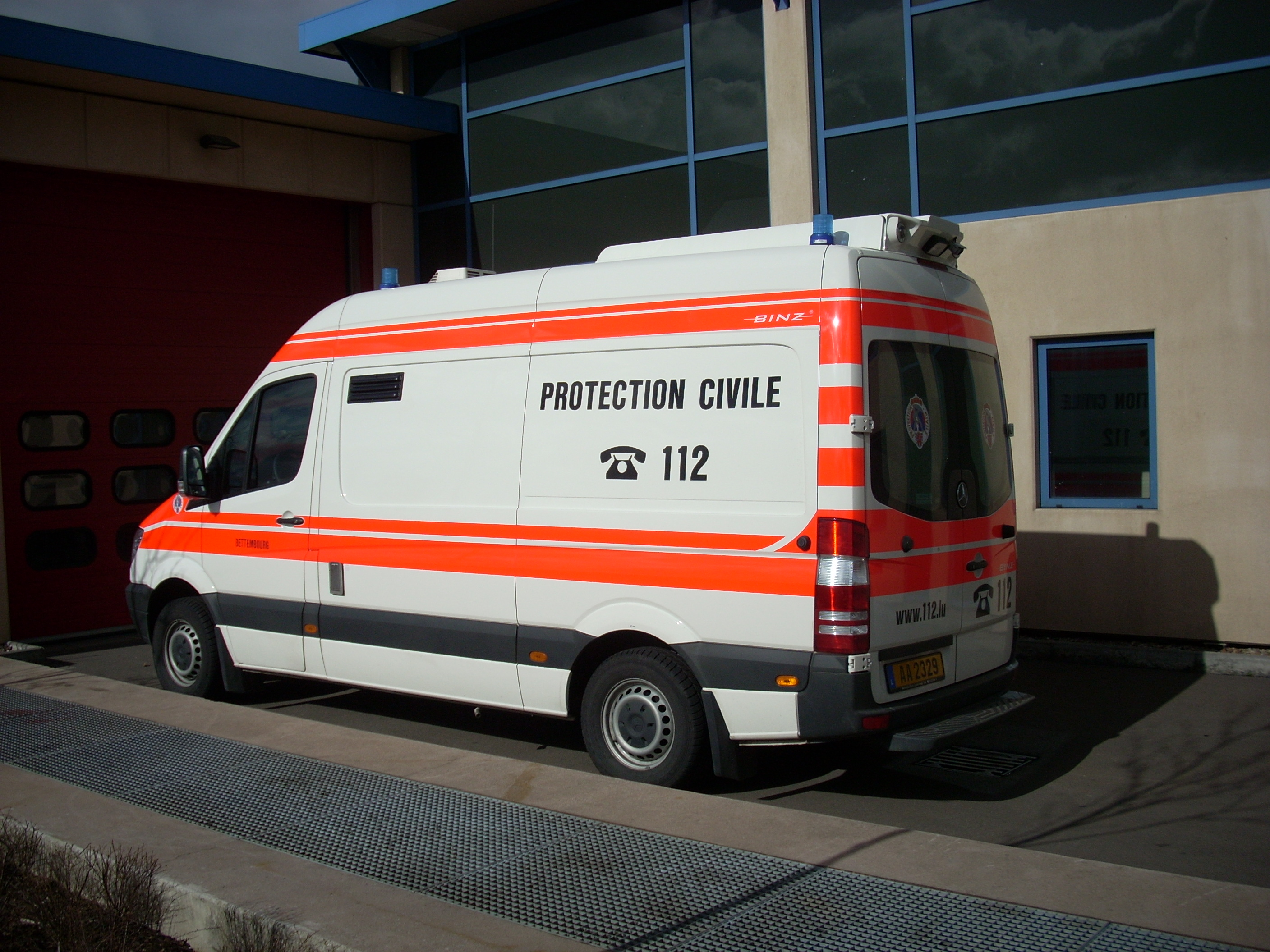 Den neisten Modell vun der Mercedez-Benz Sprinter-Reih! Photograph: Philippe Zwick